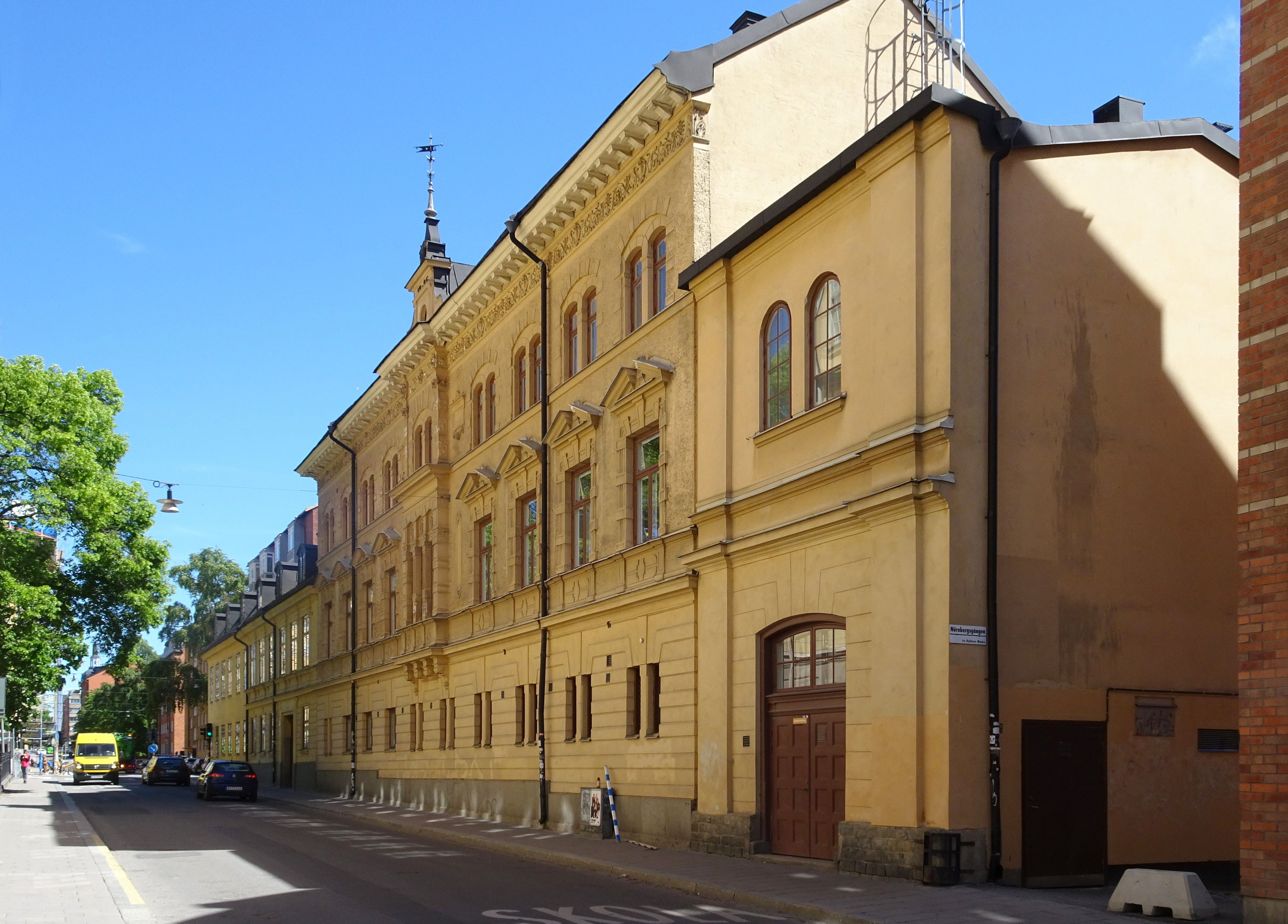 Byggnader i fastigheten Dykärret Mindre 10, hörde till Nürnbergs bryggeri